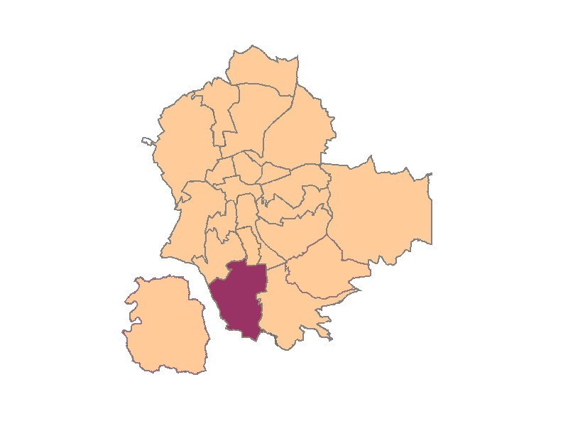 plans de saint-etienne quartier de Bellevue Solaure